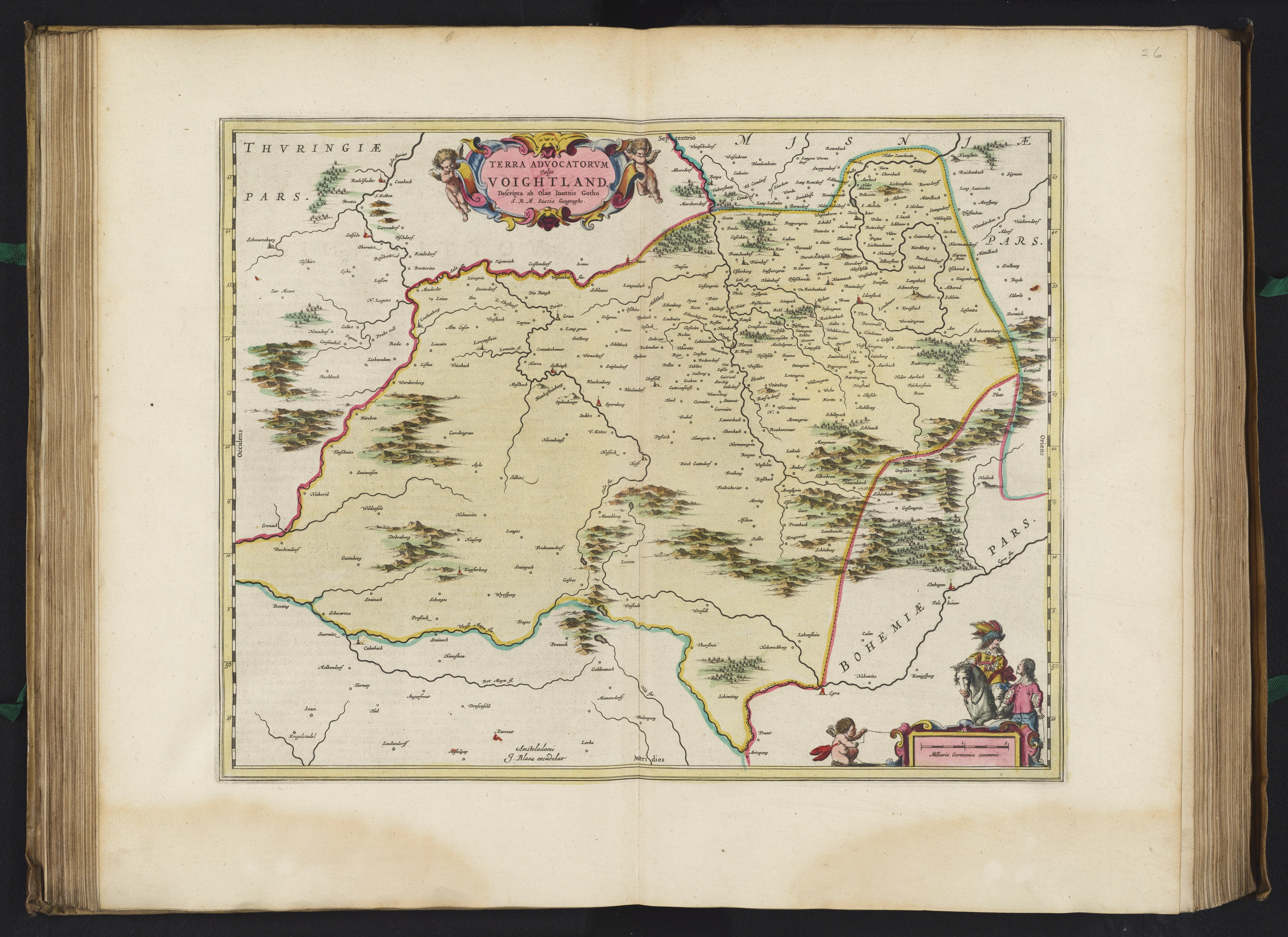 Karte des Vogtlandes, Sachsen, Deutschland. Originalgröße 39,5 x 50 cm. Kolorierte Karte mit einer altkolorierten Kartusche oben und einem altkolorierten Meilenzeiger unten rechts.